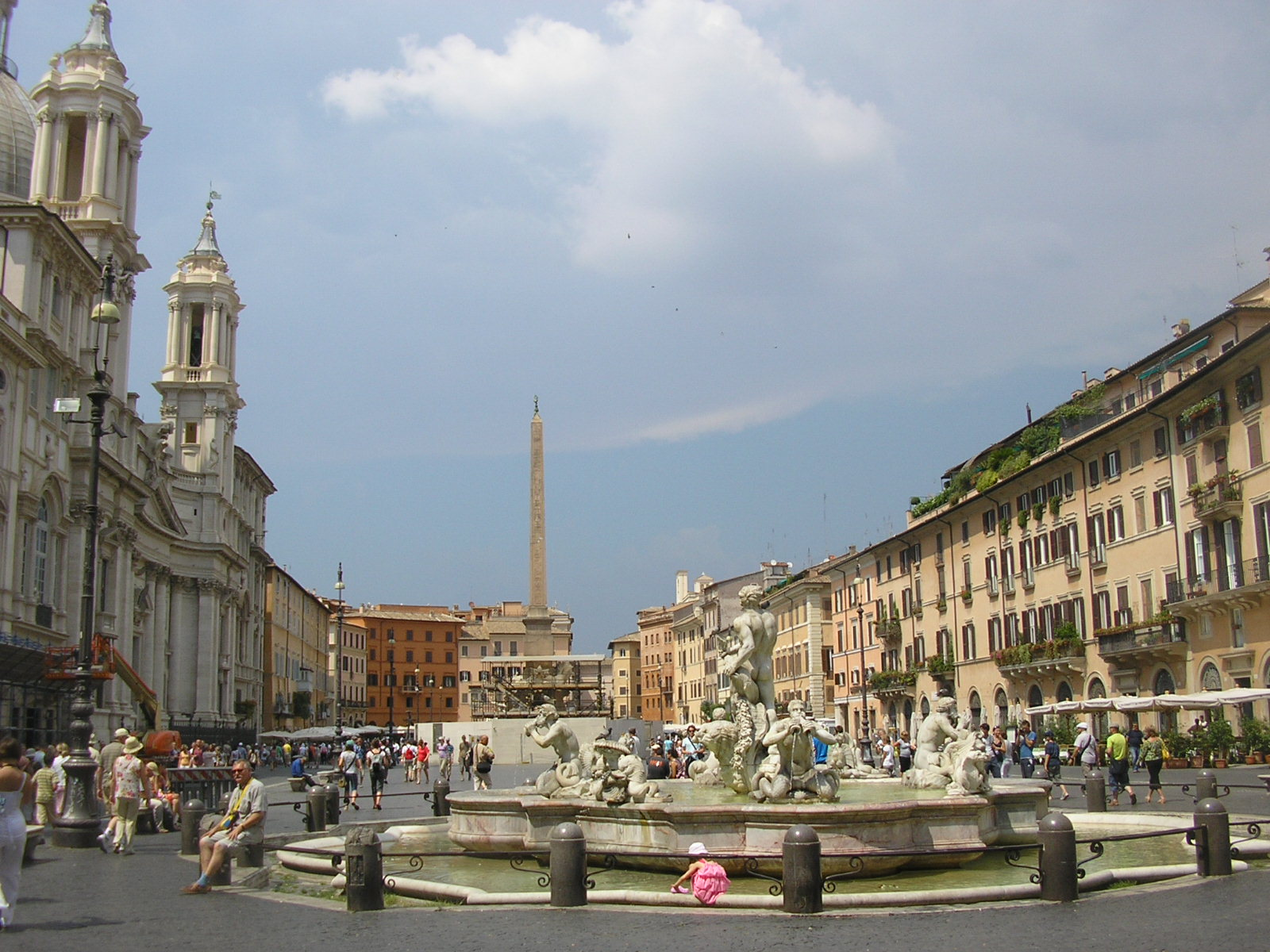 Площадь Навона